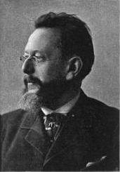 Den norske meteorologen Henrik Mohn.